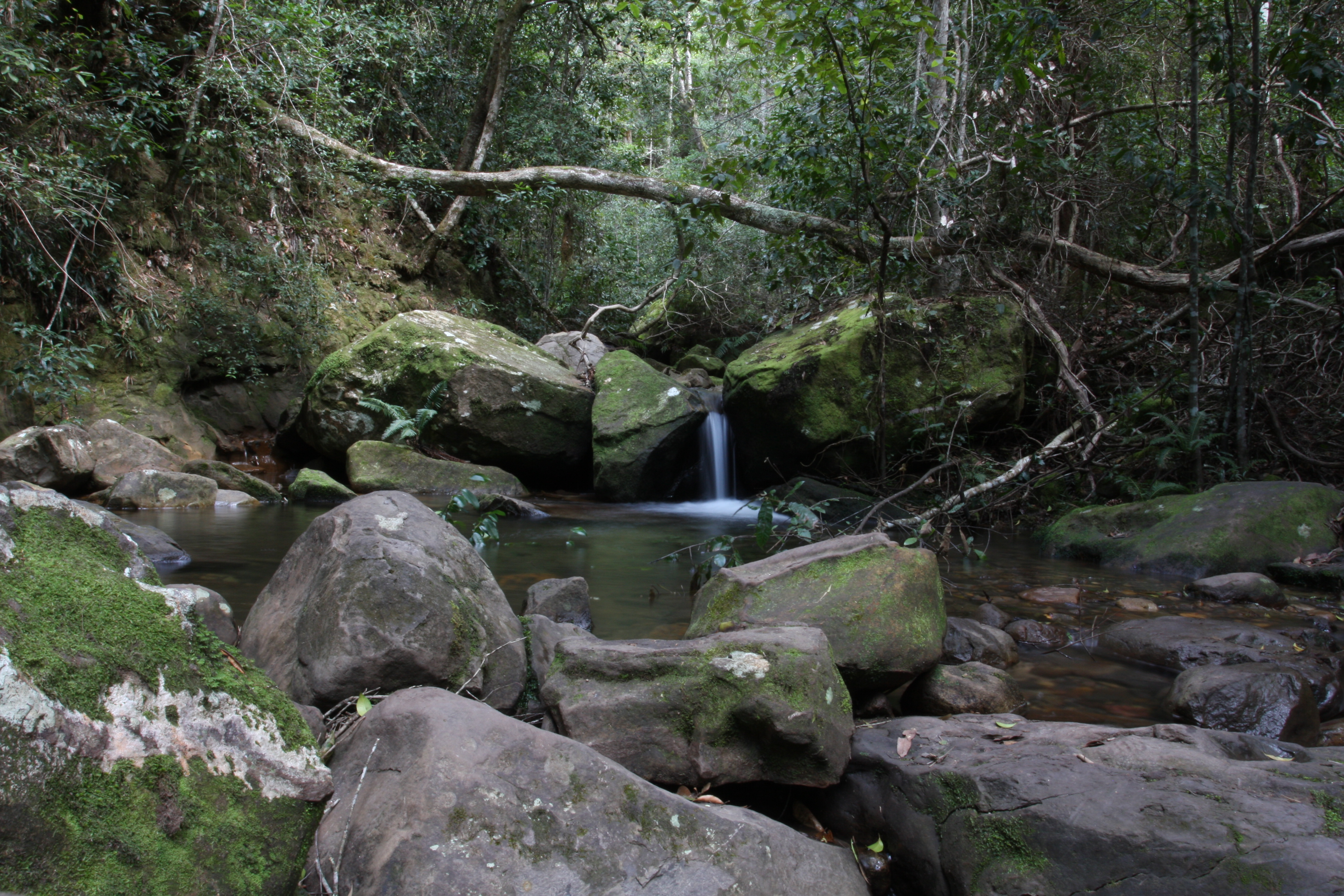 Grose Valley